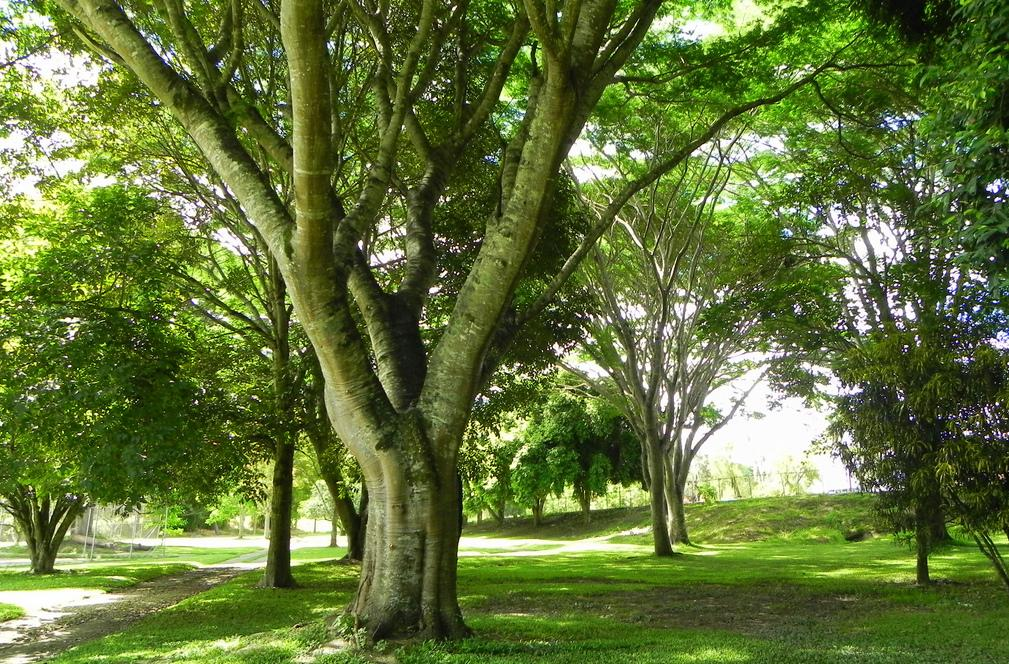 Parque en Bocono, Trujillo, Venezuela